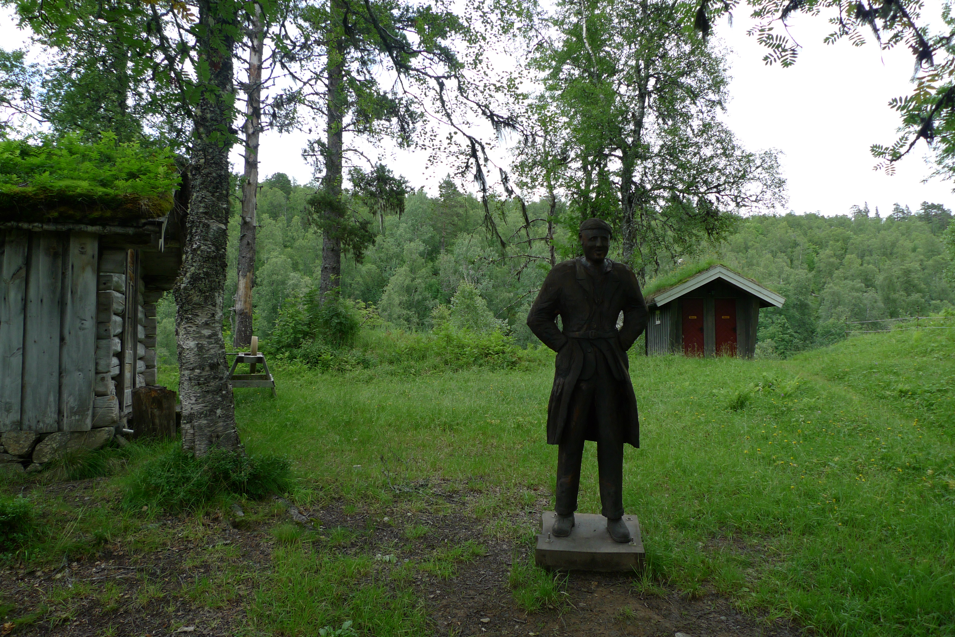 Trestatue av ornitolog, eventyrer og krigshelt James Lawrence Chaworth Musters på gården hans Vaulen i Surnadal kommune, Norge.